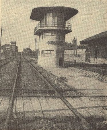 Posto de sinalização, na Estação Ferroviária de Ermesinde, em Portugal. Esta fotografia foi publicada na Gazeta dos Caminhos de Ferro n.º 1290, de 16 de Setembro de 1941, e digitalizada pela Hemeroteca Municipal de Lisboa.